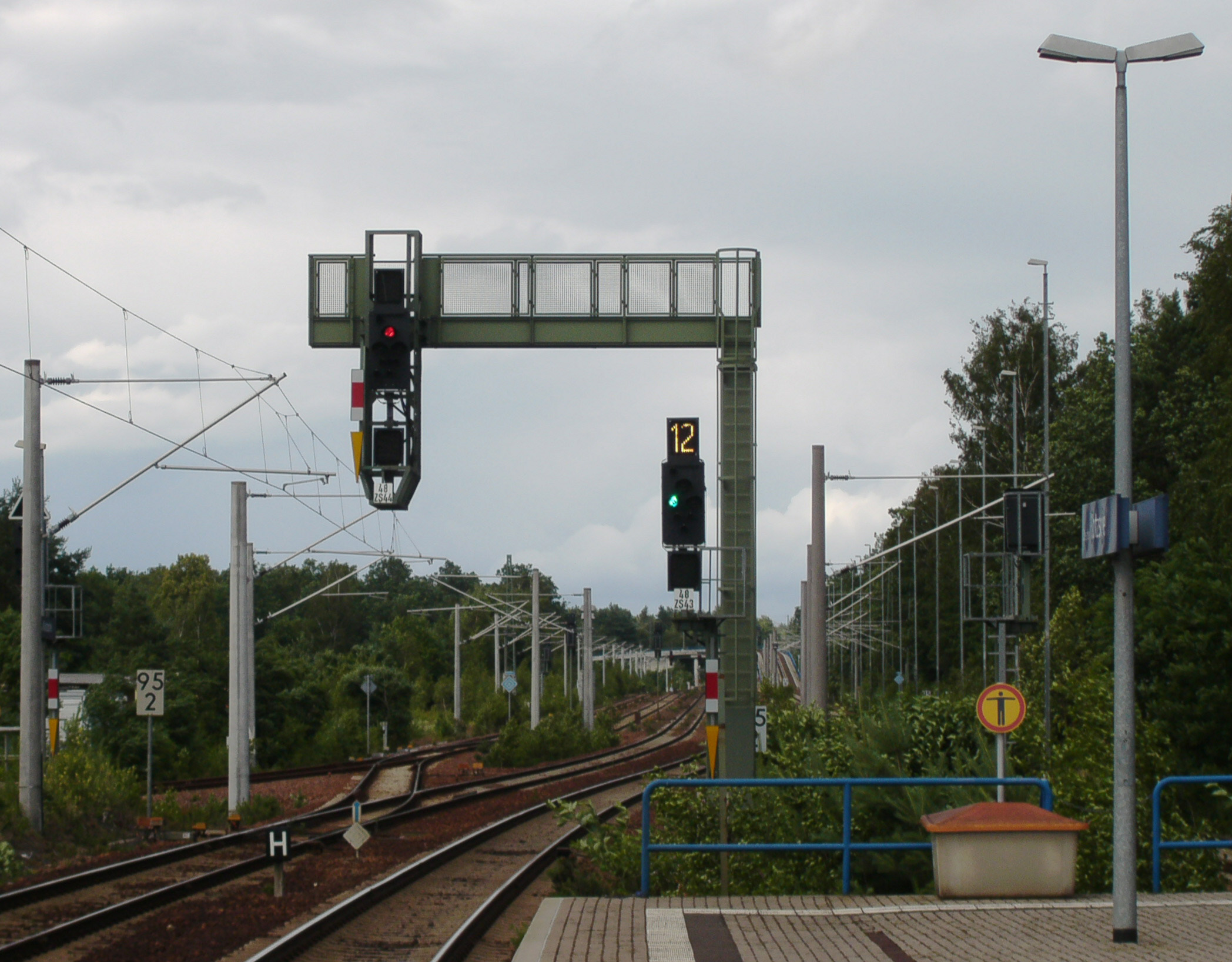 Hp0 auf Signalbrücke (linkes Gleis) und Ks1 (rechtes Gleis) in Dresden-Klotzsche, Blick Richtung Osten. Im Vordergrund die beiden Gleise der Bahnstrecke Görlitz–Dresden, im Hintergrund die Überführung der Strecke zum Flughafen.